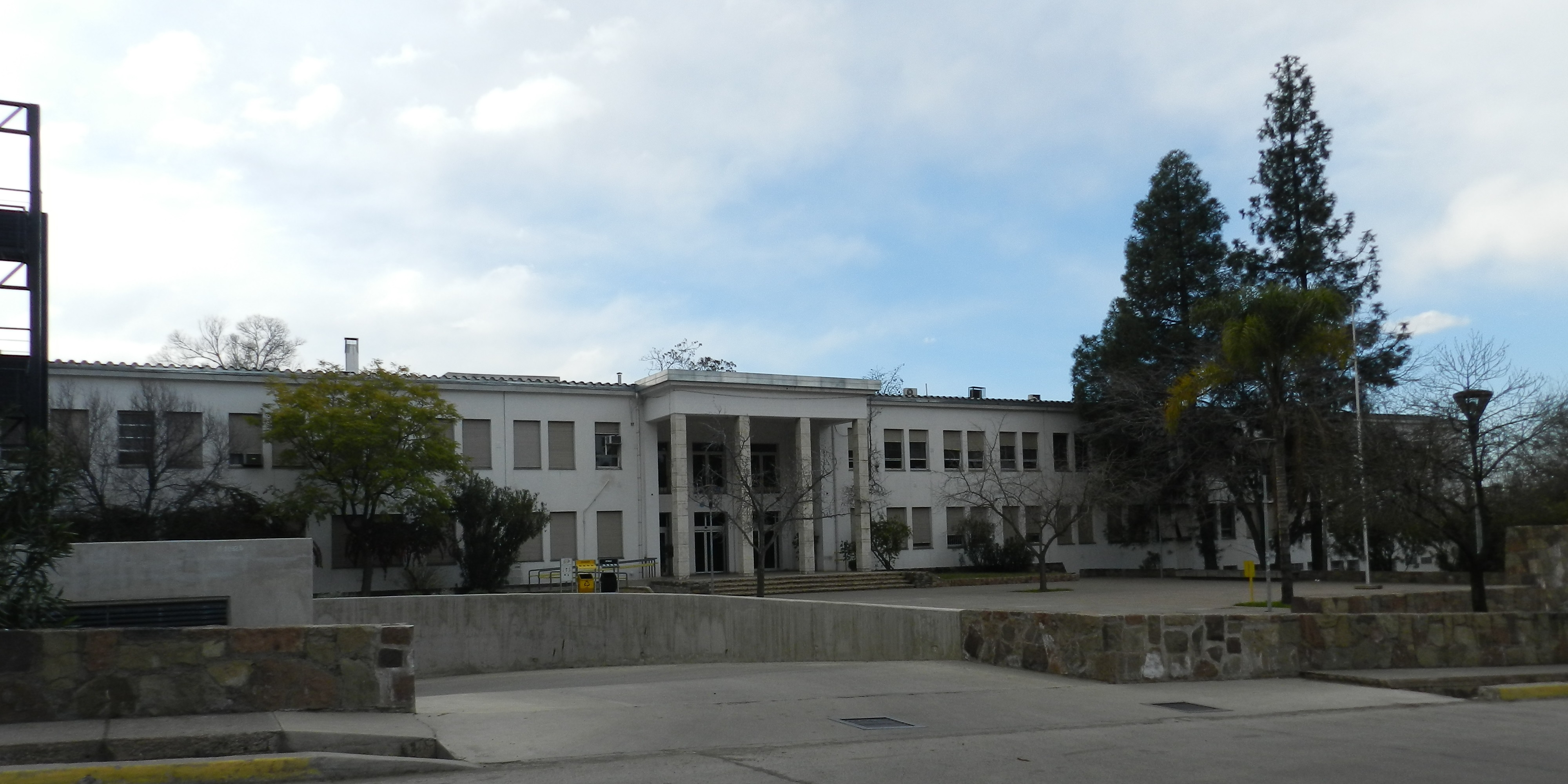 Sede de la Facultad de Ciencias Médicas, UNCuyo.